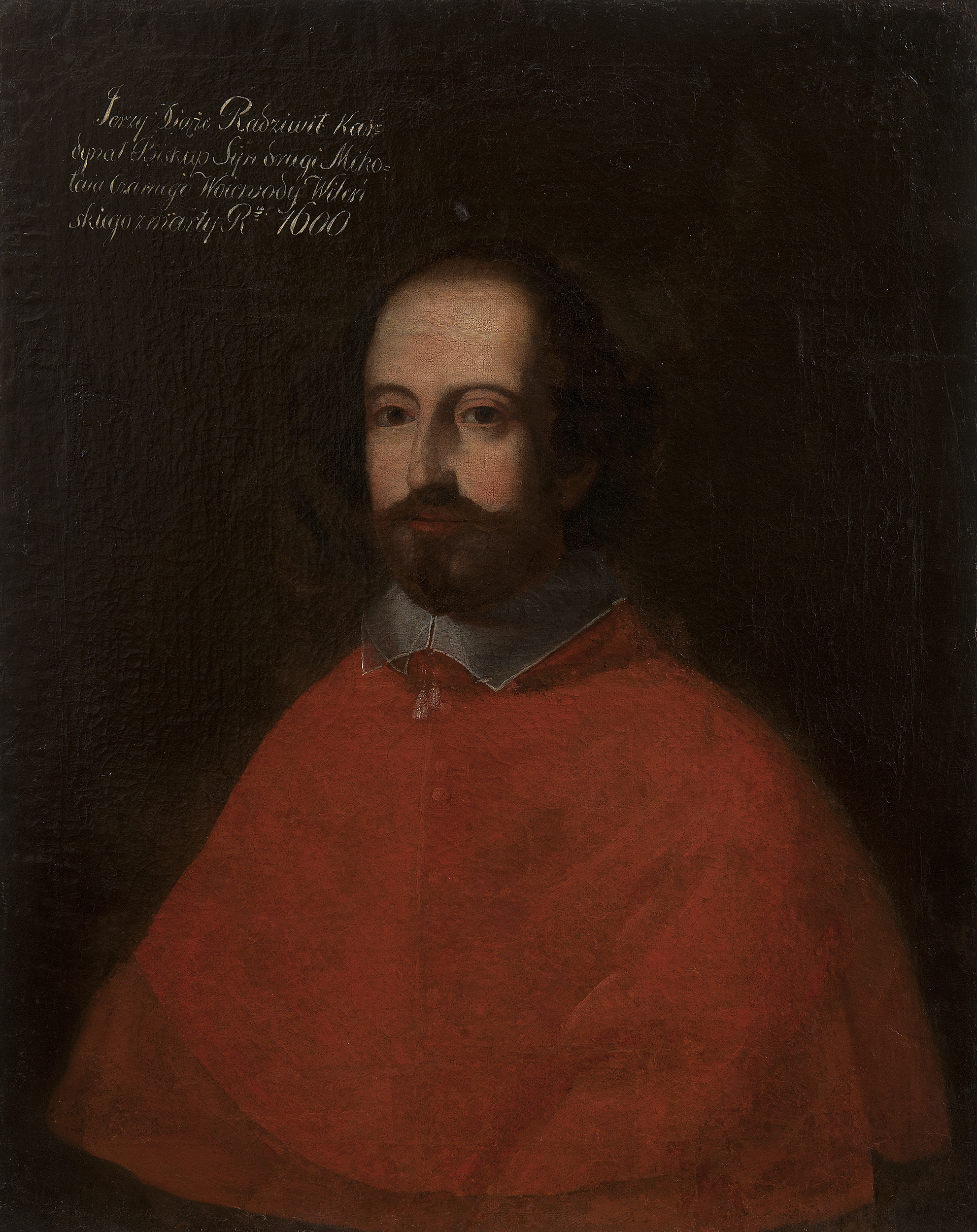 Беларуская (тарашкевіца): Меркаваны партрэт Юрыя Радзівіла (Jury Radzivił)